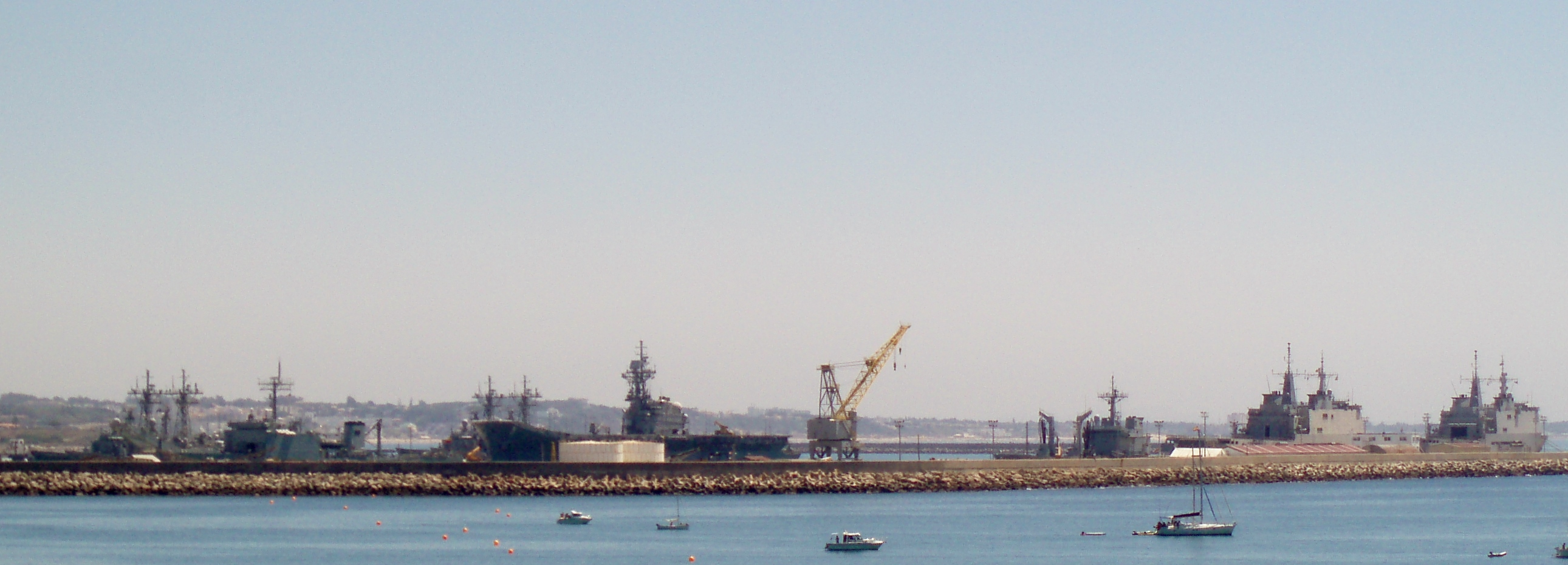 Varios buques españoles en la base naval de Rota (España): Muelle nº:2 4 fragatas de Clase Santa María Numancia (F-82) Victoria (F-83) Navarra (F-85) Canaria (F-86) Príncipe de Asturias (R-11) 1 clase Pizarro (Clase Newport)* Muelle nº: 1 Marques de la Ensenada (A-11) 2 clase Galicia Galicia (L-51) Castilla (L-52)